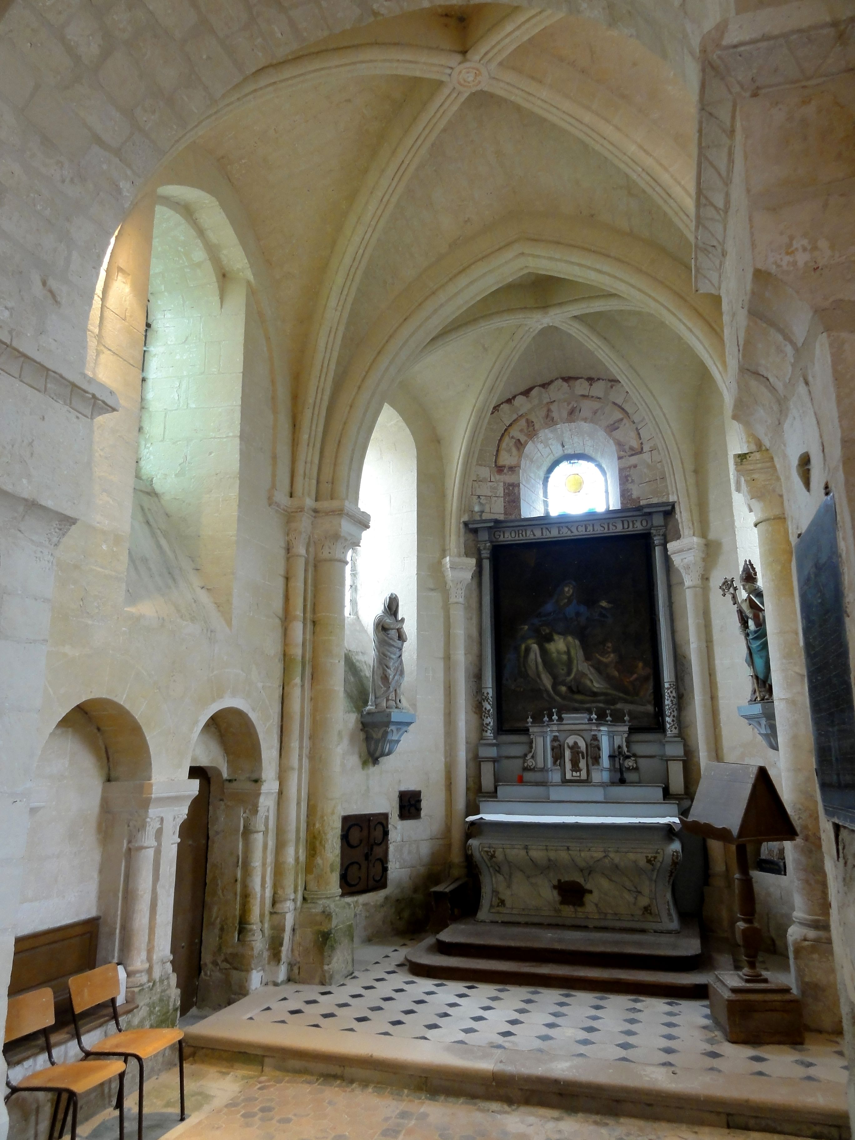 Chœur.